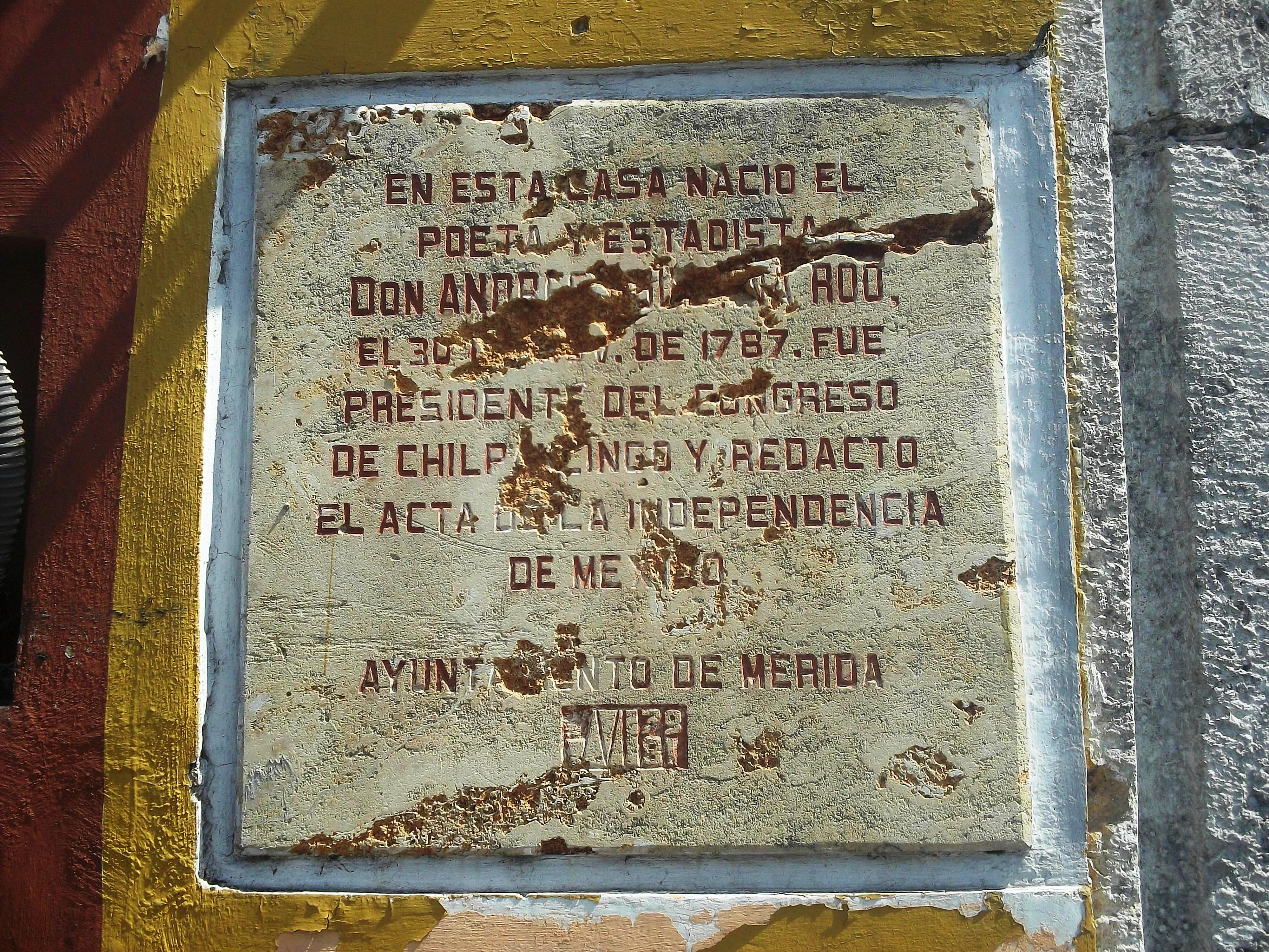 Placa conmemorativa que señala donde estuvo la casa donde nació Andrés Quintana Roo.